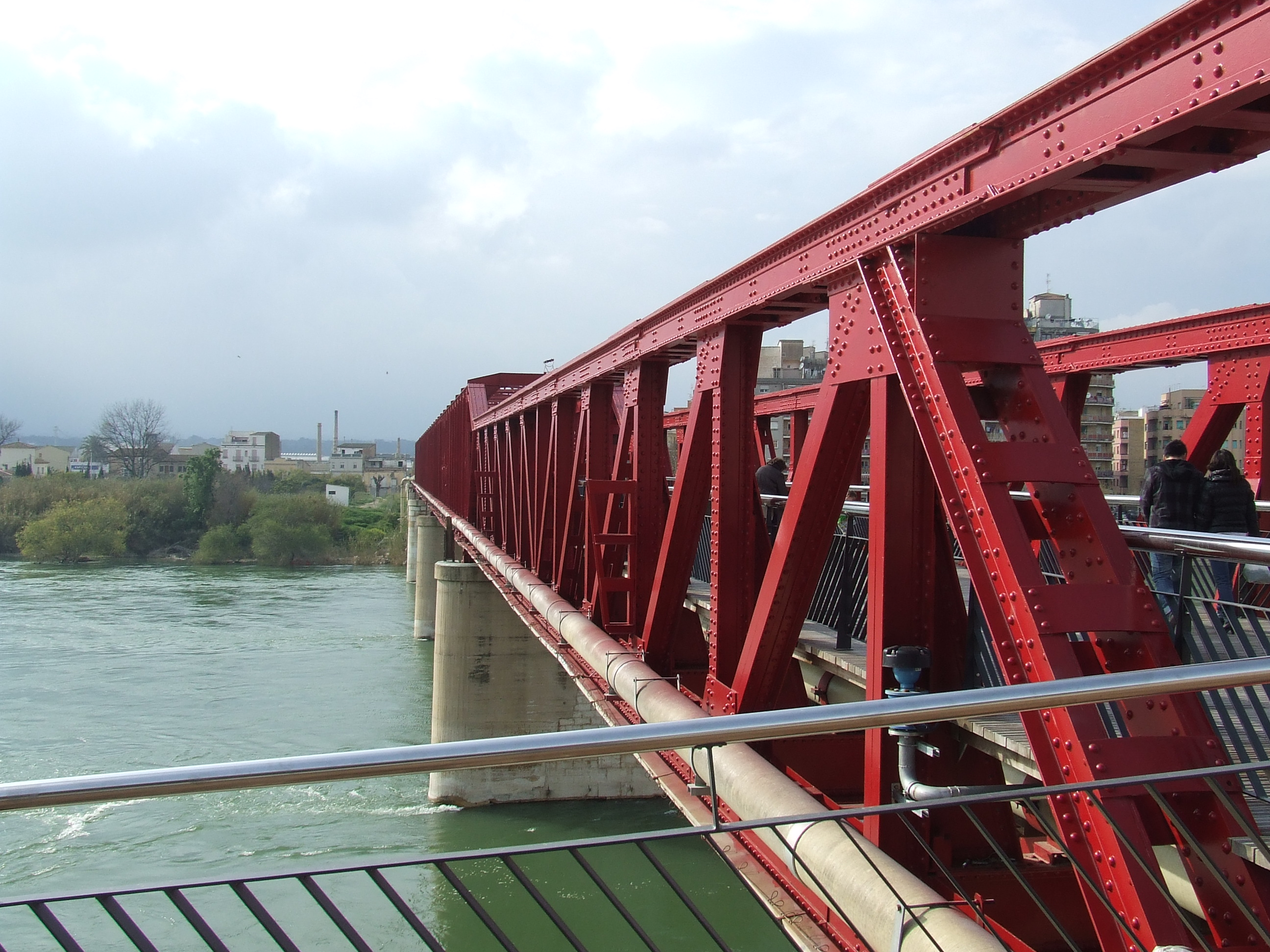 Antiguo puente del ferrocaril de la línea Puebla de Híjar/Alcañiz-Tortosa, La que se conocia como Val de Zafán. Recientemente rehabilitado, el puente, forma parte de la Via Verde que es en lo que se convirtió la antigua línia de tren. La Via Verde, para uso de peatones i ciclistas, está previsto que llegue hasta el Delta.